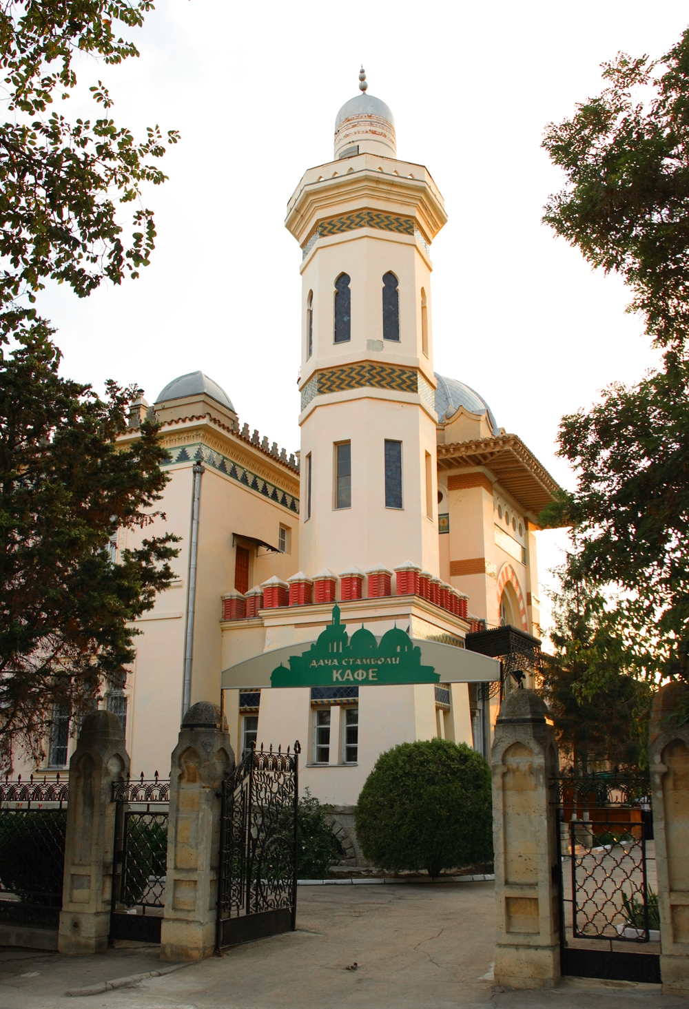 Дача Стамболи в Феодосии